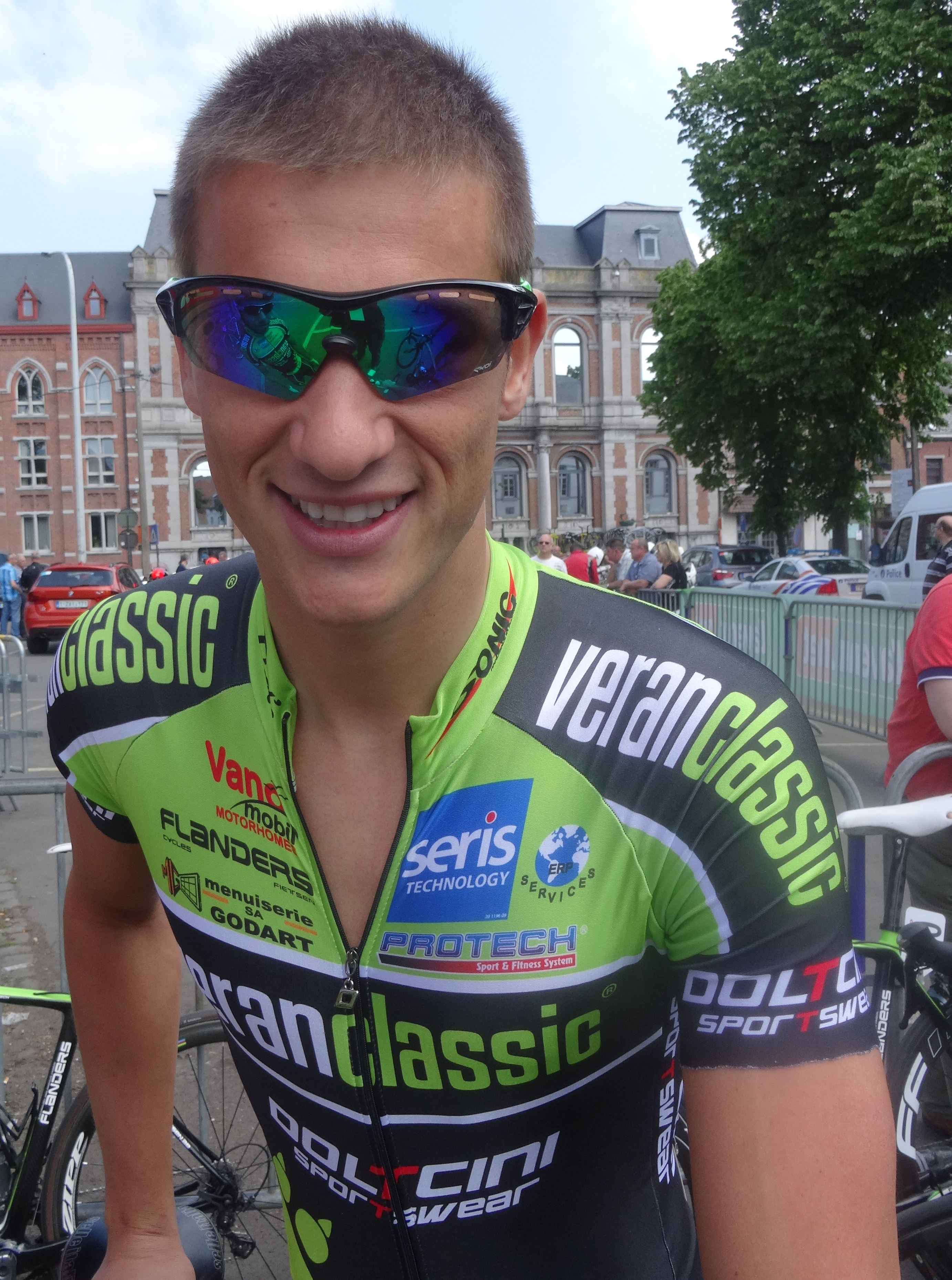 Reportage réalisé le samedi 17 mai à l'occasion du départ du Grand Prix Criquielion 2014 à Boussu, Belgique.